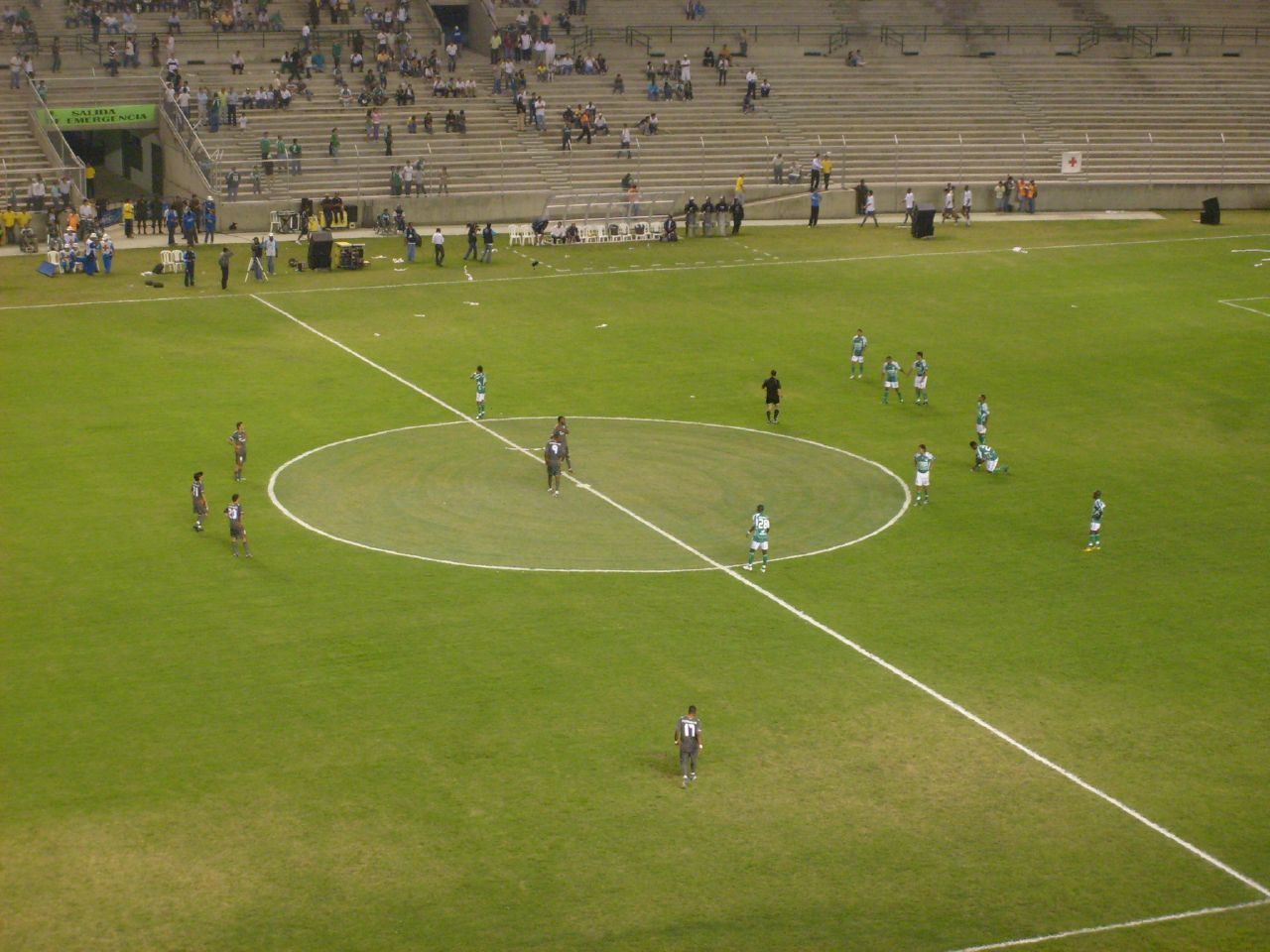 Estadio Deportivo Cali - Palmaseca Valle del Cauca - Colombia